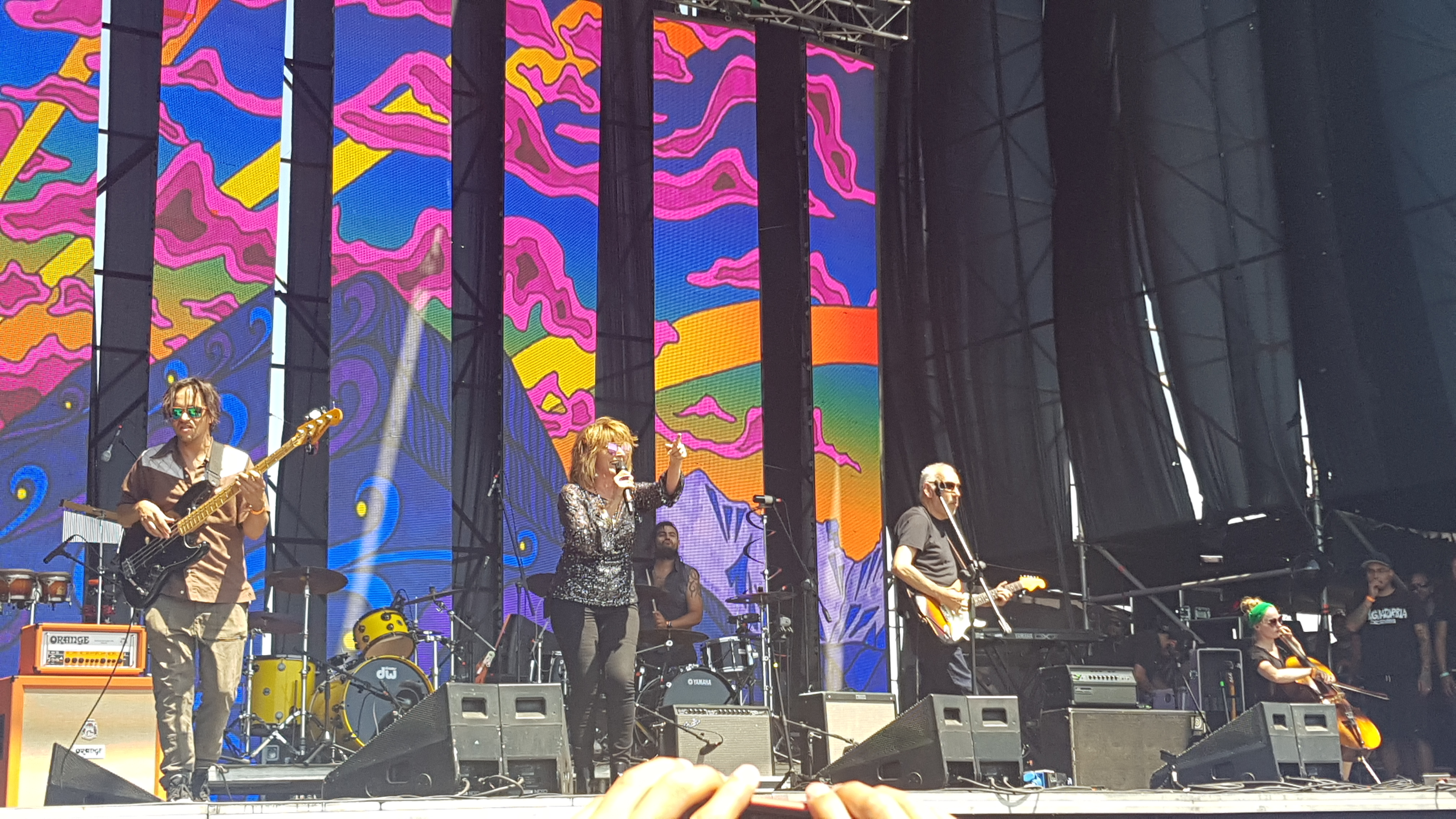 Aguaturbia durante la Cumbre del Rock Chileno 2018, el 27/01/2018